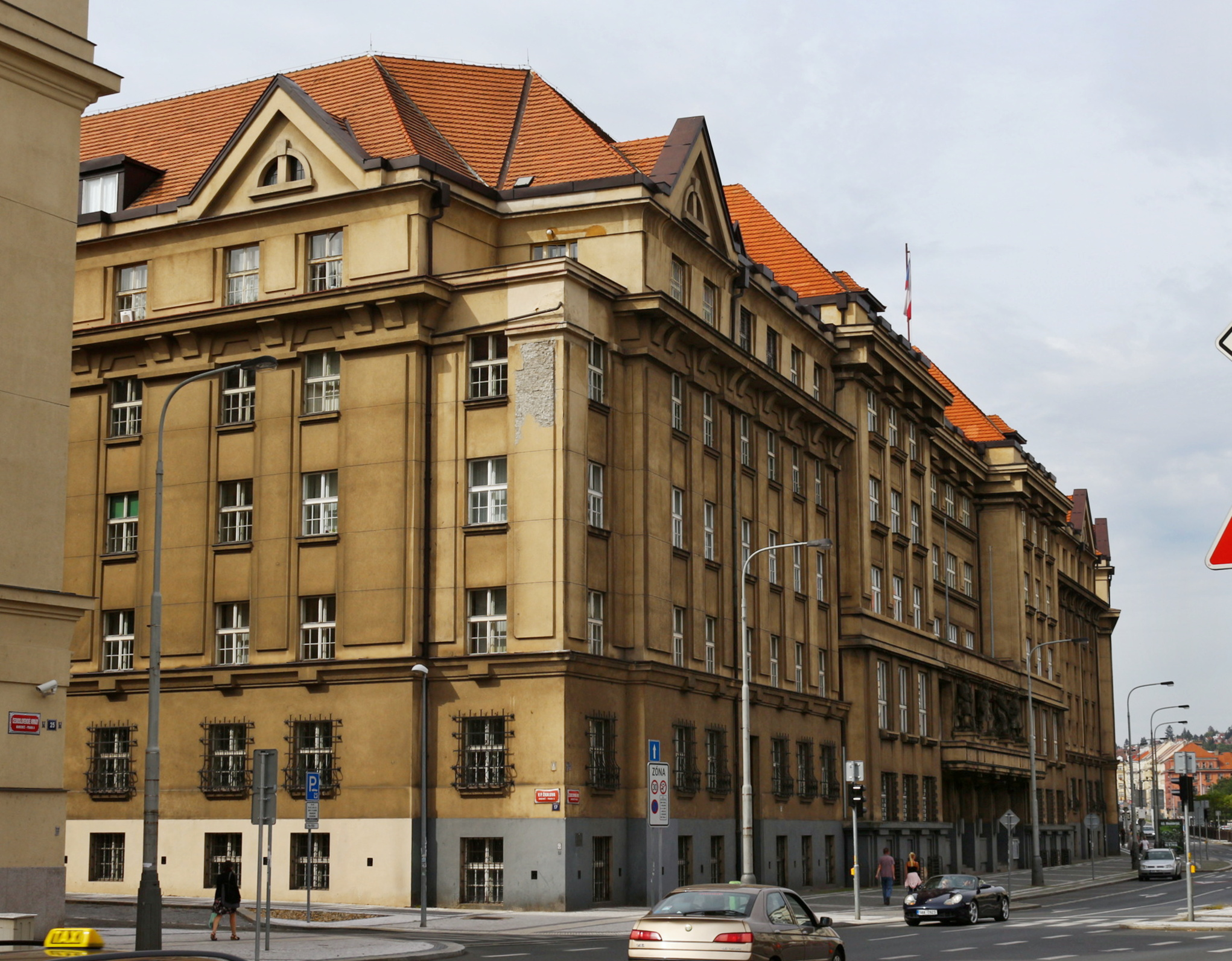 Praha 6-Bubeneč, Náměstí Svobody 4 - budova Mininisterstva obrany